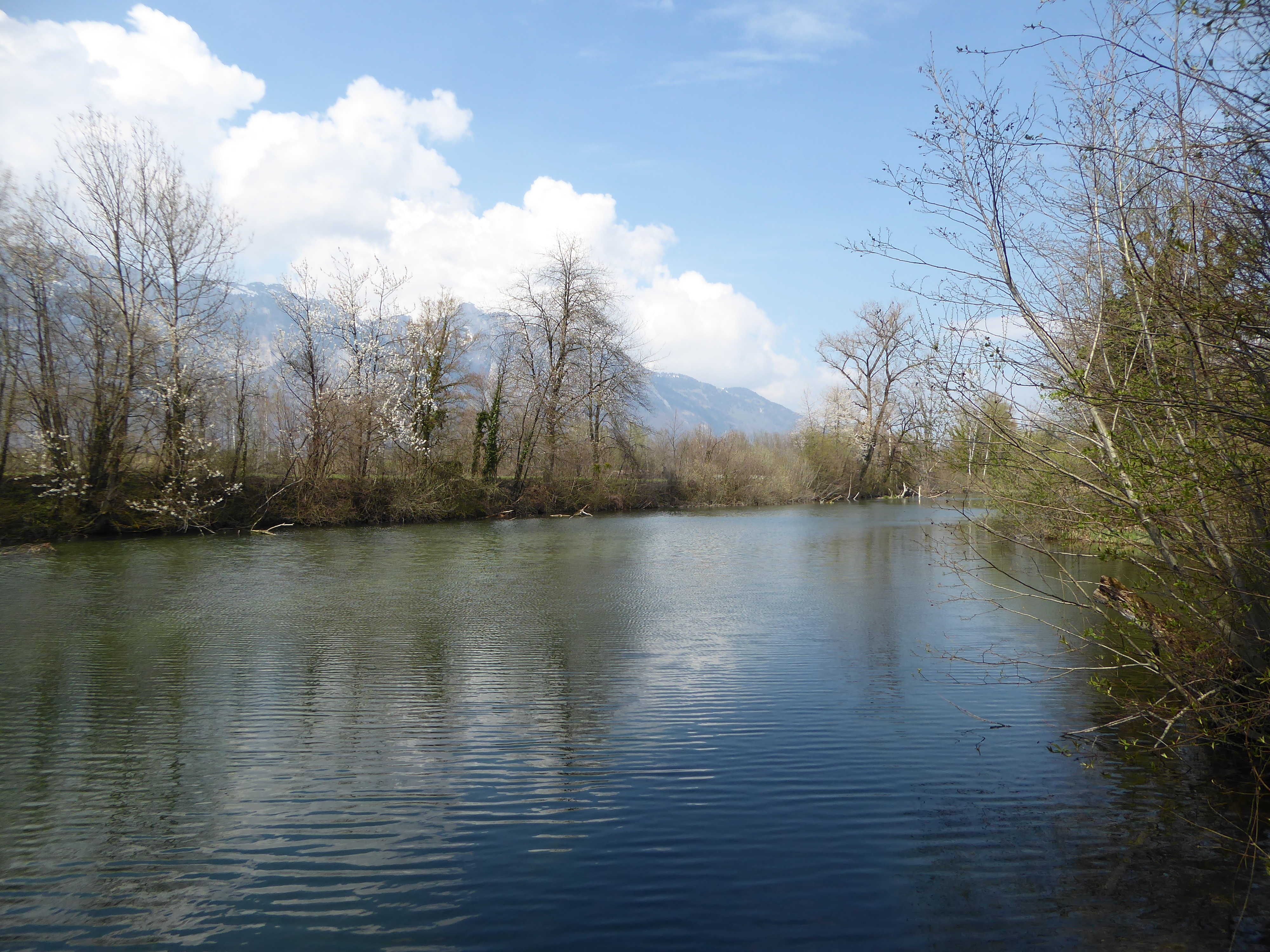 Gampriner Seelein, im Hintergrund Hoher Kasten